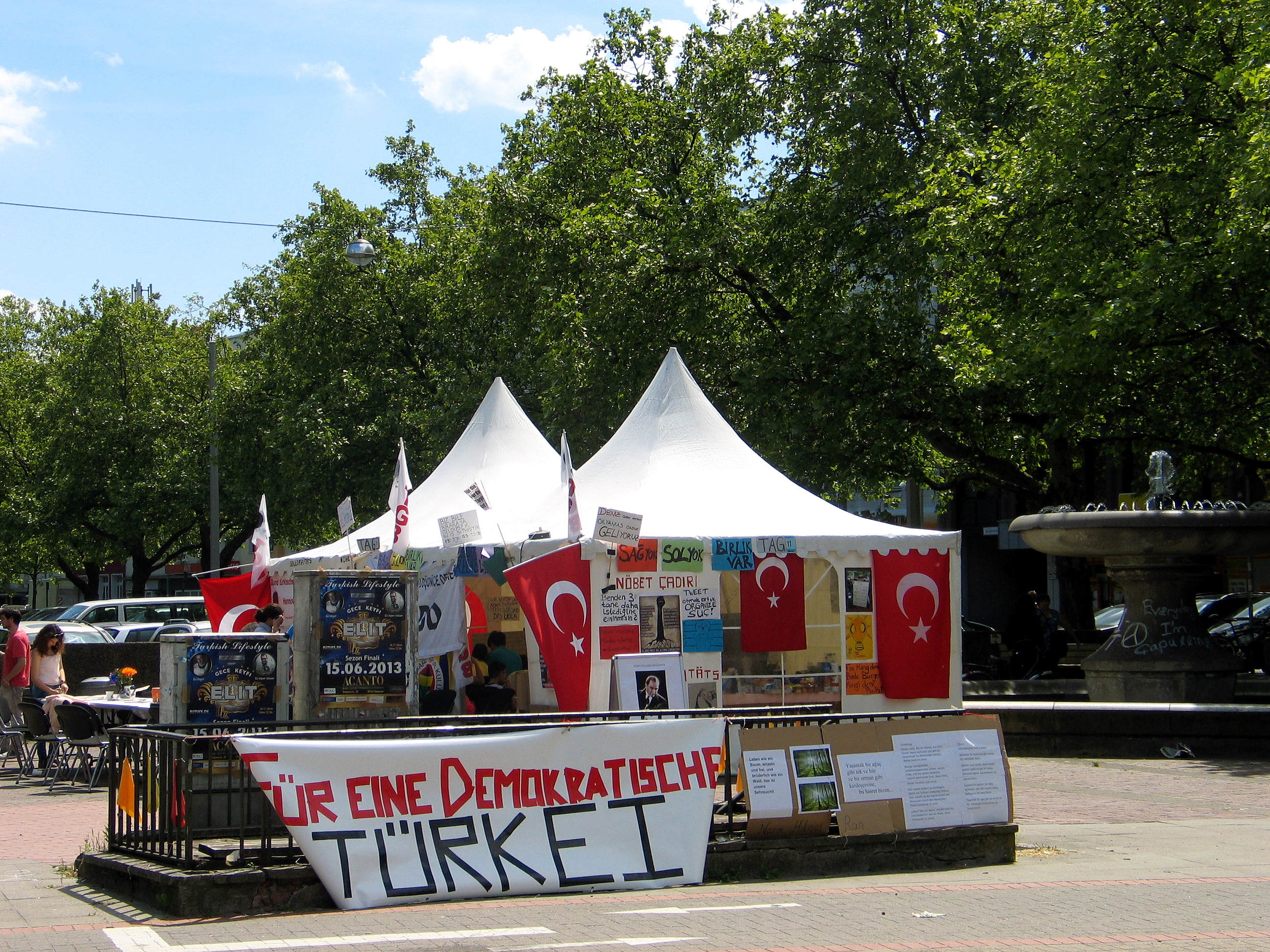 "Für eine demokratische Türkei" informiert dieses Transparent vor den Zelten der Mahnwache auf dem Klagesmarkt in Hannover anlässlich der Proteste in der Türkei gegen das Demokratieverständnis der Regierung Erdoğans ...